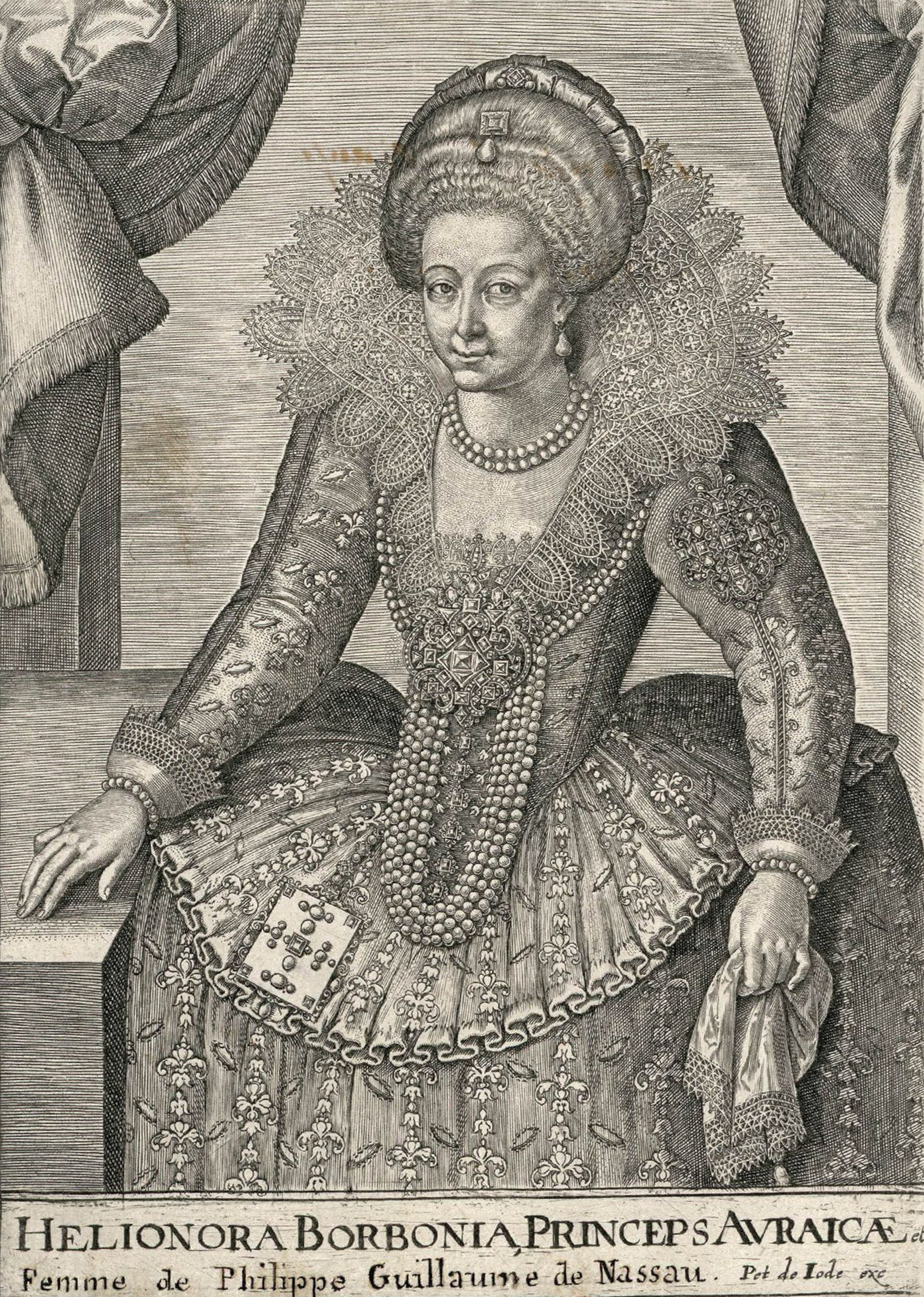 Éléonore de Bourbon, Ehefrau von Philipp Wilhelm von Oranien-Nassau